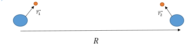 איור 1: המערכת המתארת שני אטומי מימן באינטראקציית ואן דר ואלס (דיפול ביניהן). הפרמטרים כרשום בציור ובערך עצמו.